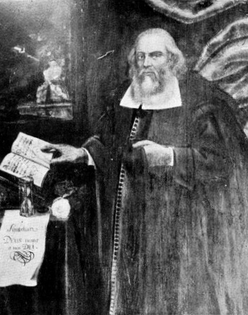 Stephan Pilarick (1615–1693), Exulant und evangelischer Pfarrer in Neu-Salz/Oberlausitz